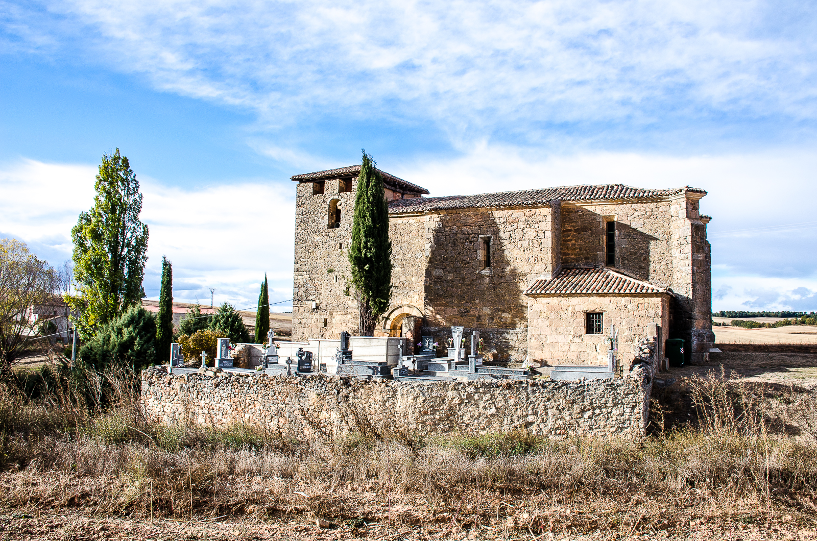 Iglesia de la Asunción de Nuestra Señora. Sotovellanos (Burgos - España). 2018.